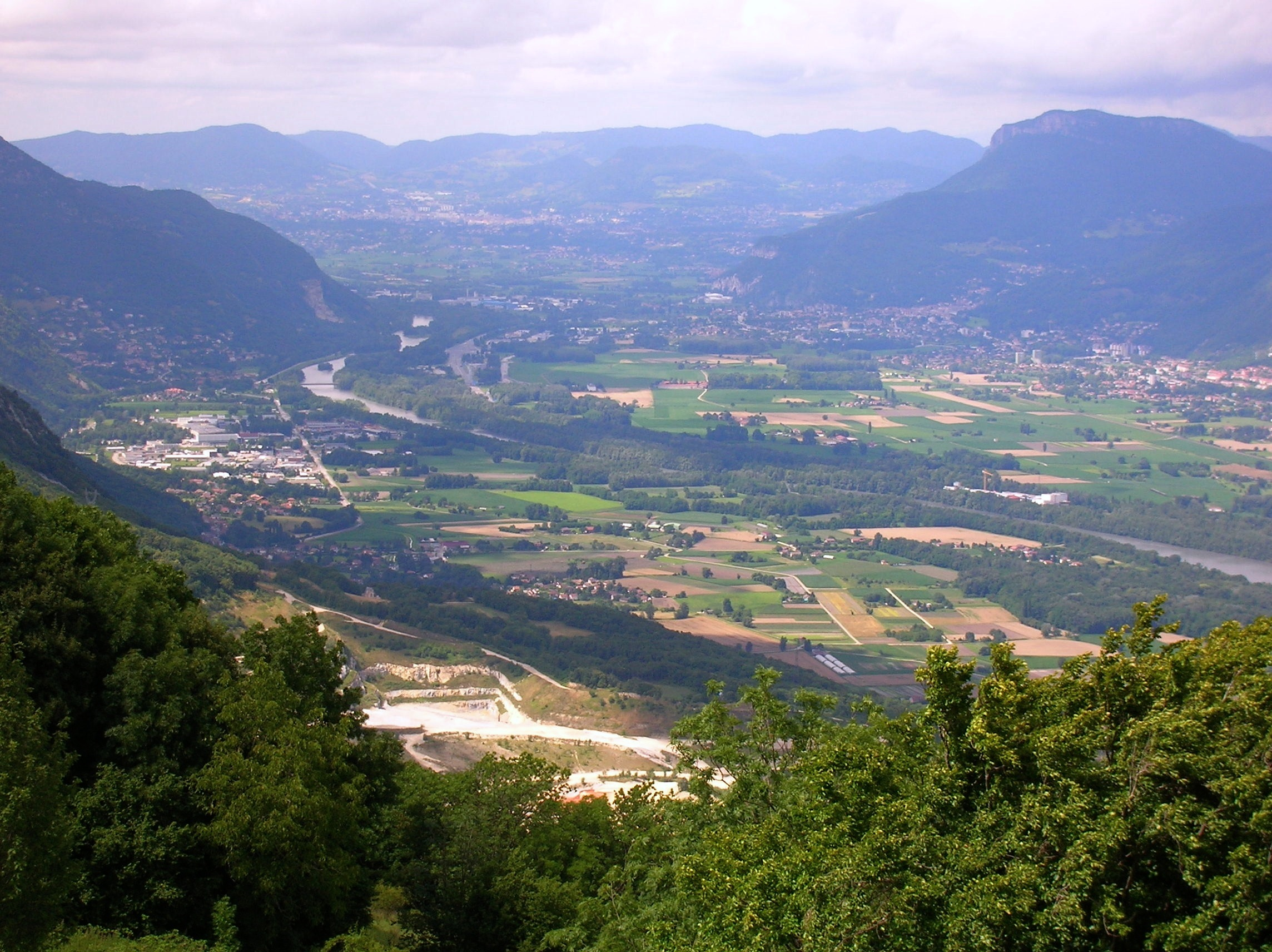 Panorama da vicino Noyarey (Ferme Durant), Veurey-Voroize a sx e oltre fiume Voreppe.